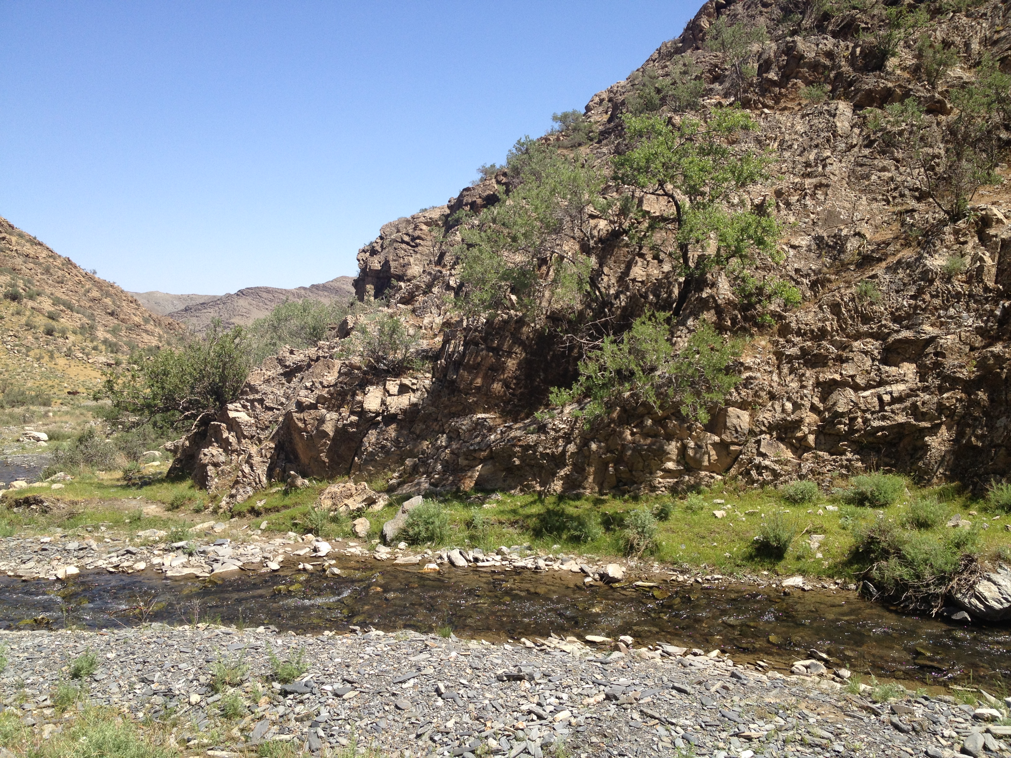 Деревья на берегу Сапсая, Нуратау